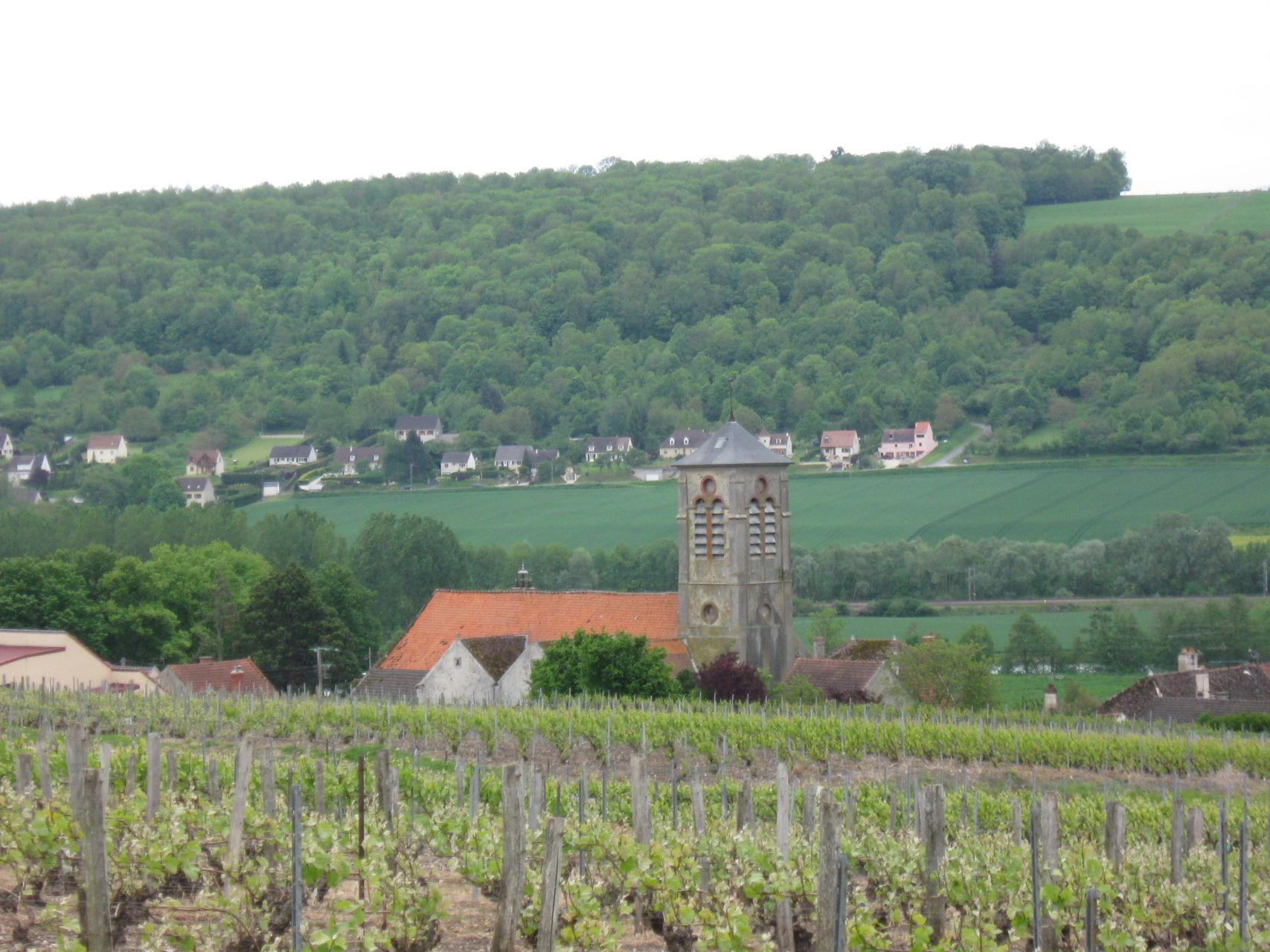 Vignobles et église St-Sébastien de Saulchery (Aisne , région Picardie)